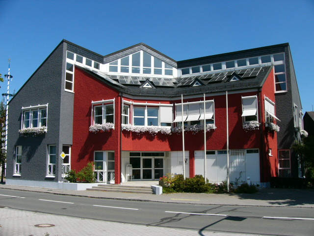 Rathaus in Oberkotzau